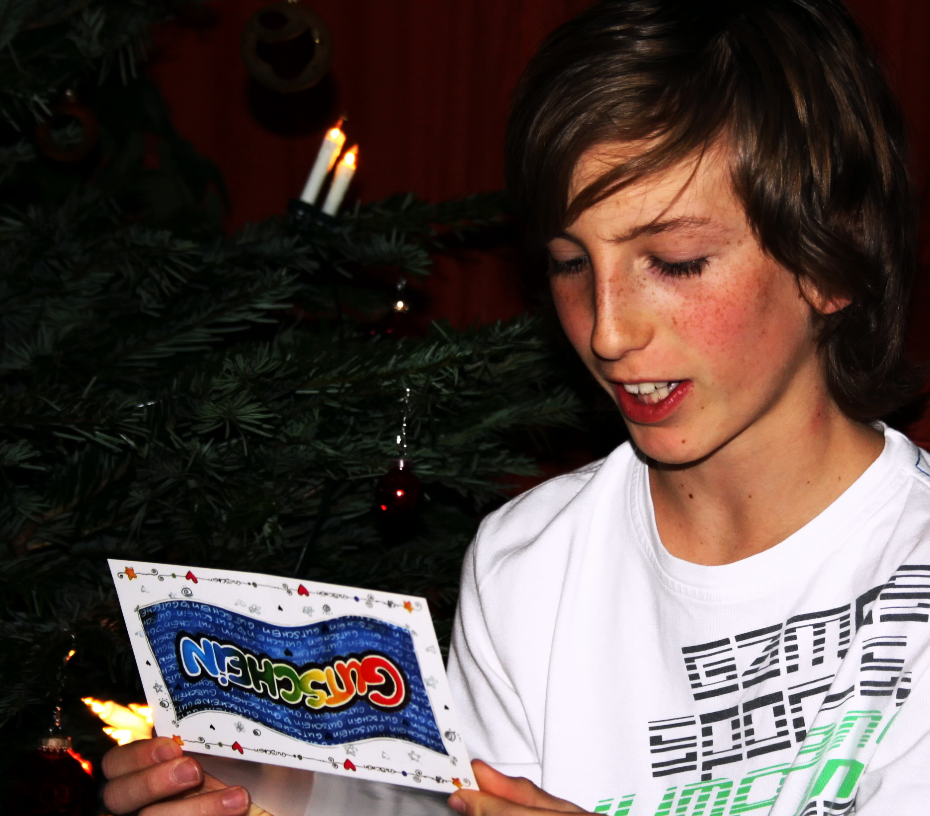 Gutschein zu Weihnachten.